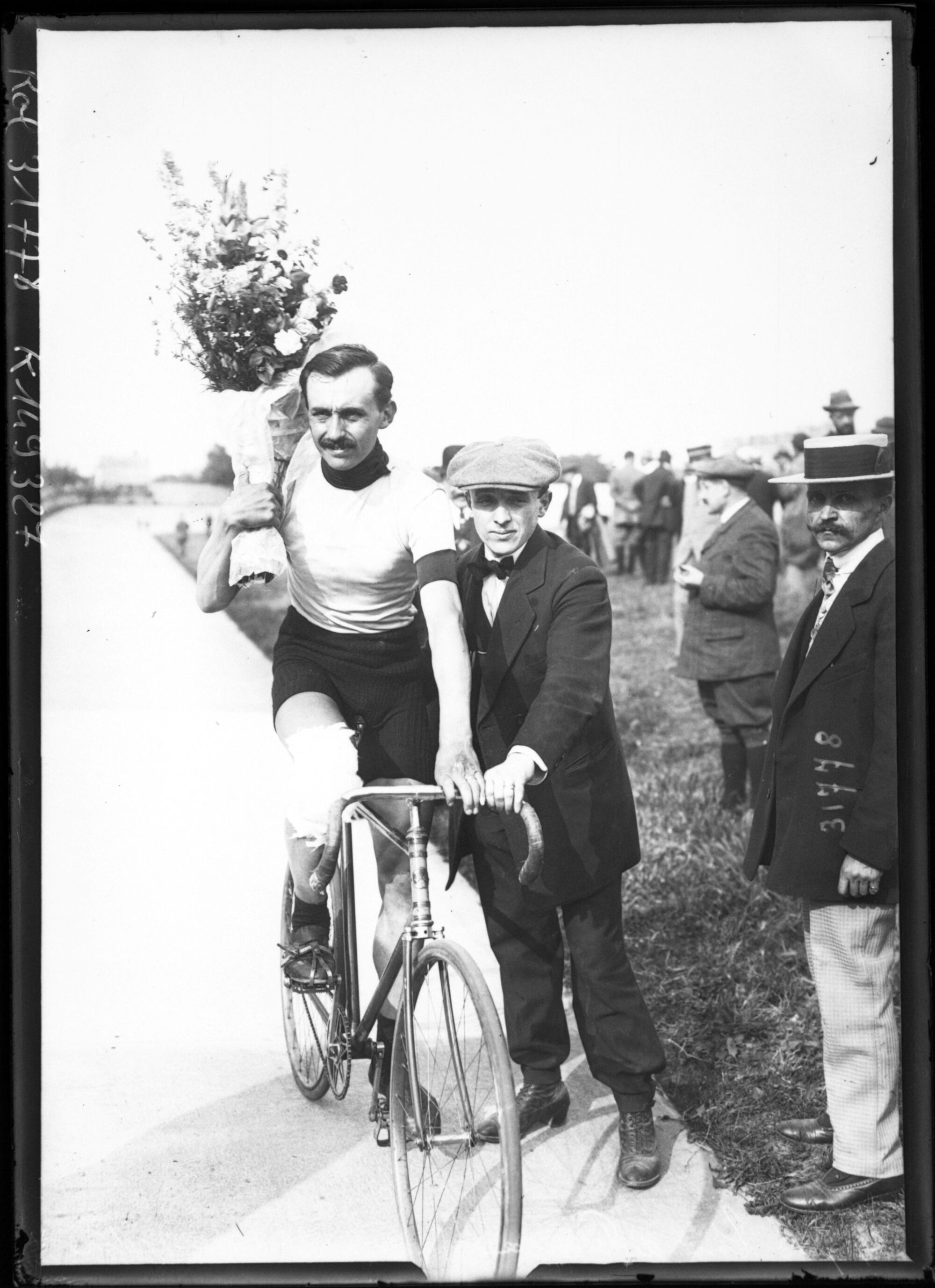 Lucien Petit-Breton, à l'arrivée du Tour de France 1913